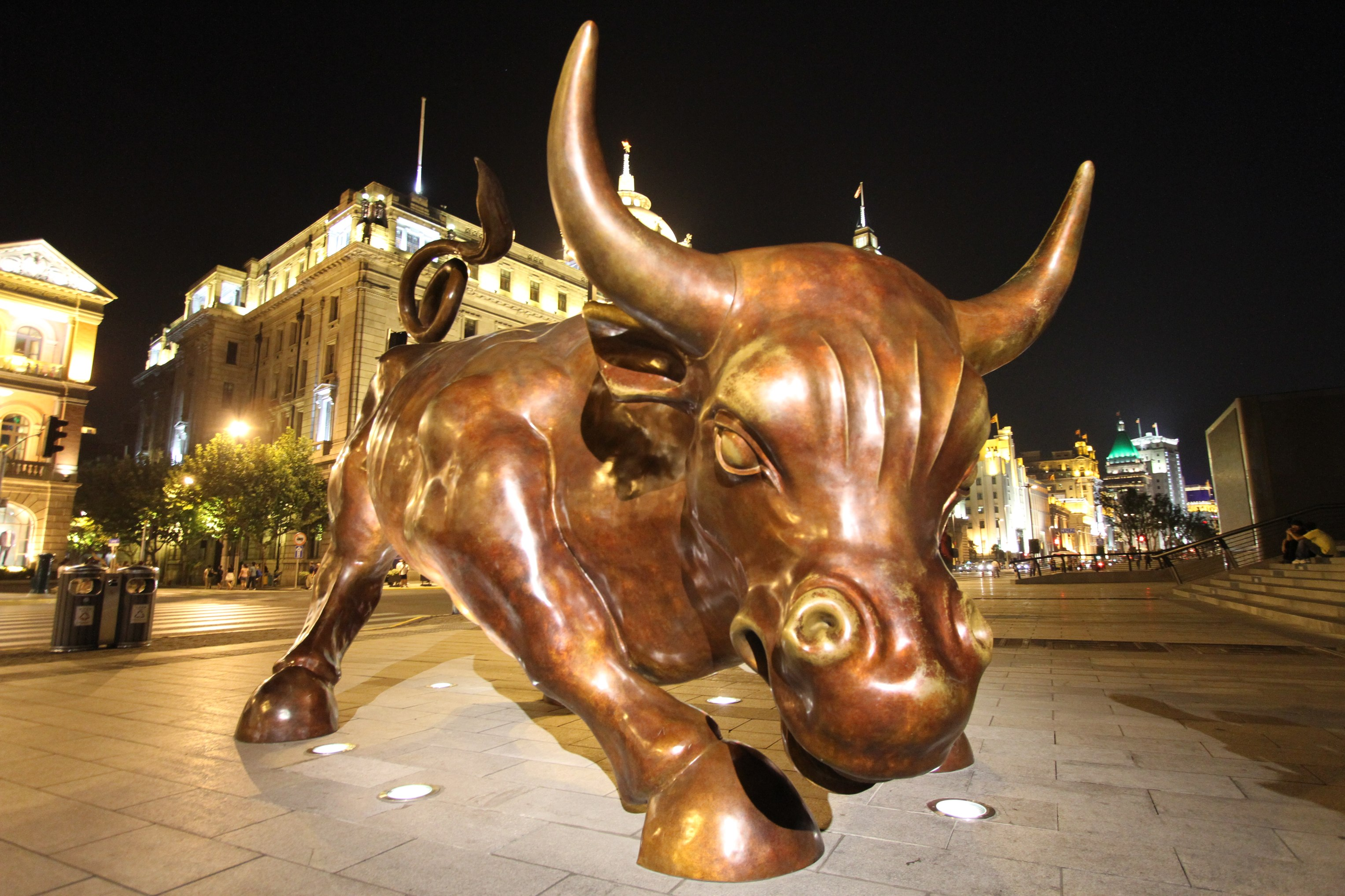 Bund Bull